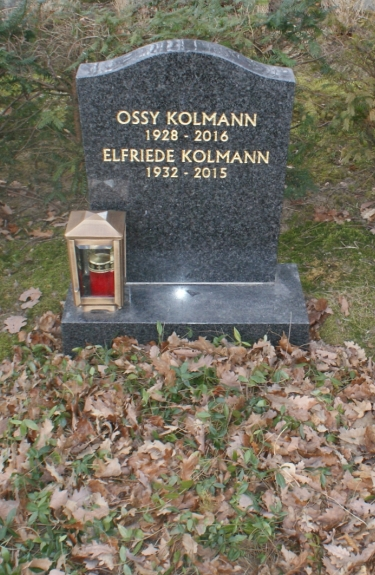 Ossy Kolmann-Neustifter Friedhof